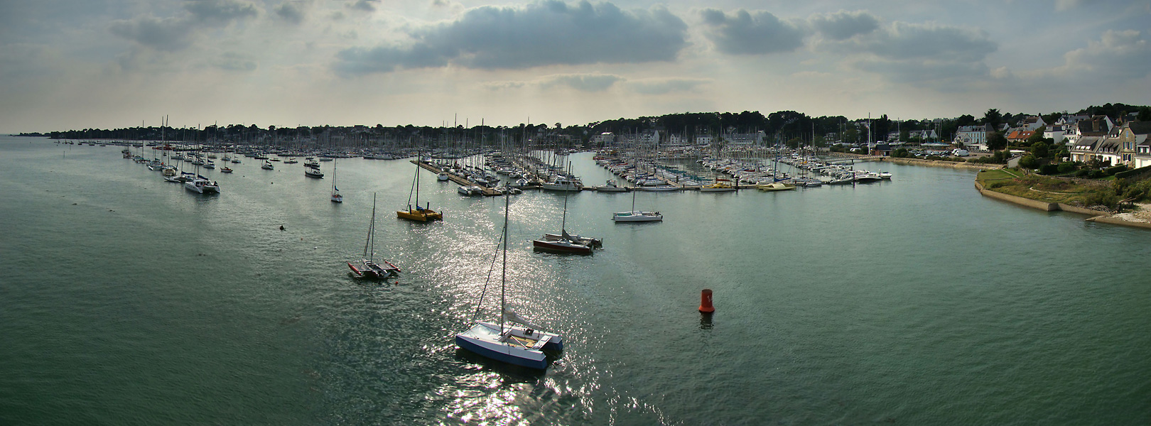 La Trinité-sur-Mer, Morbihan, Bretagne, France.